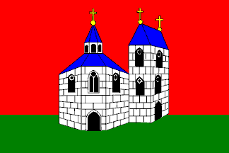 vlajka města Sadská